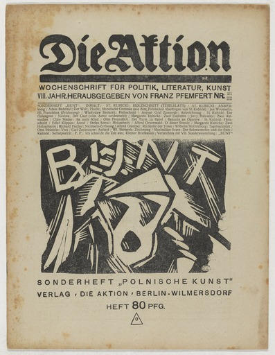 Die Aktion Juni 1918 Bunt. Titelblattillustration von Stanisław Kubicki. Bunt (Künstlergruppe)